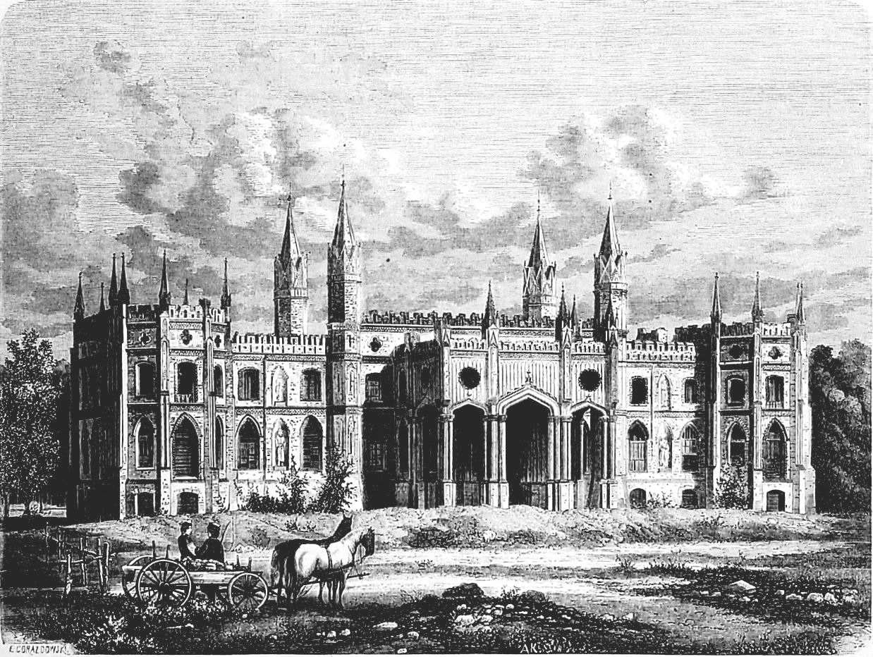 Zamek w Dospudzie